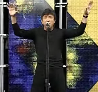 Juan Bau cantando